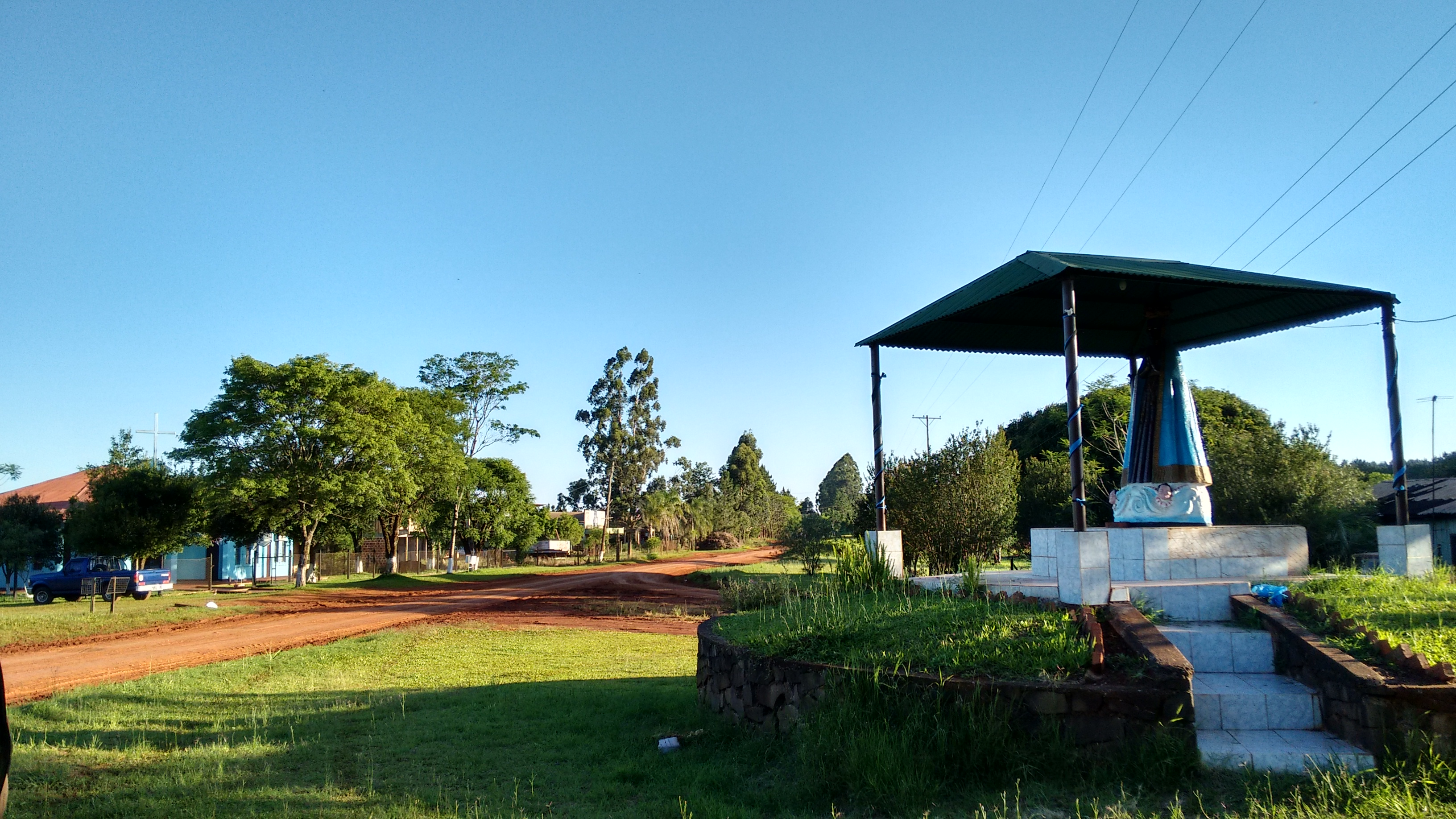 Estatua de la Virgen Aparecida, que representa a Colonia Aparecida, Departamento Veinticinco de Mayo. Provincia de Misiones.